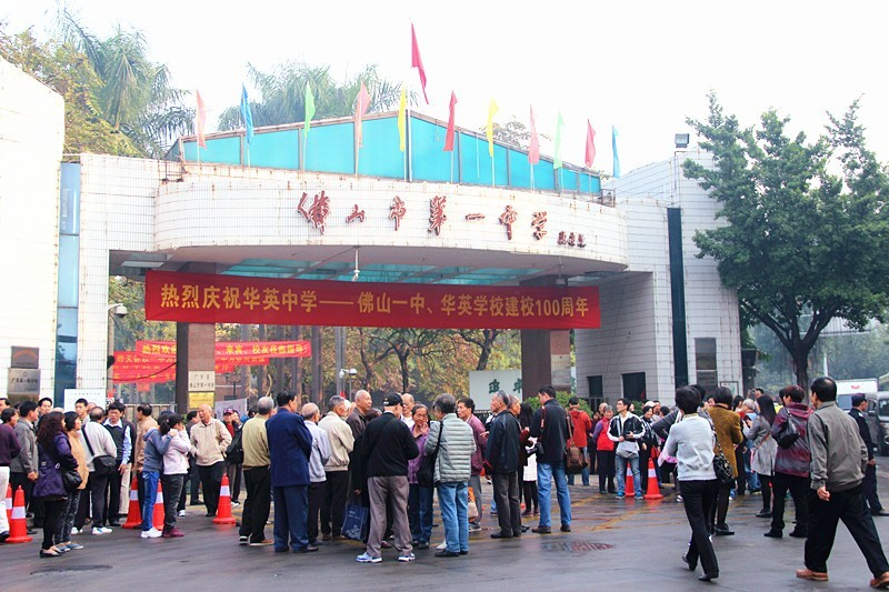 佛山一中校门